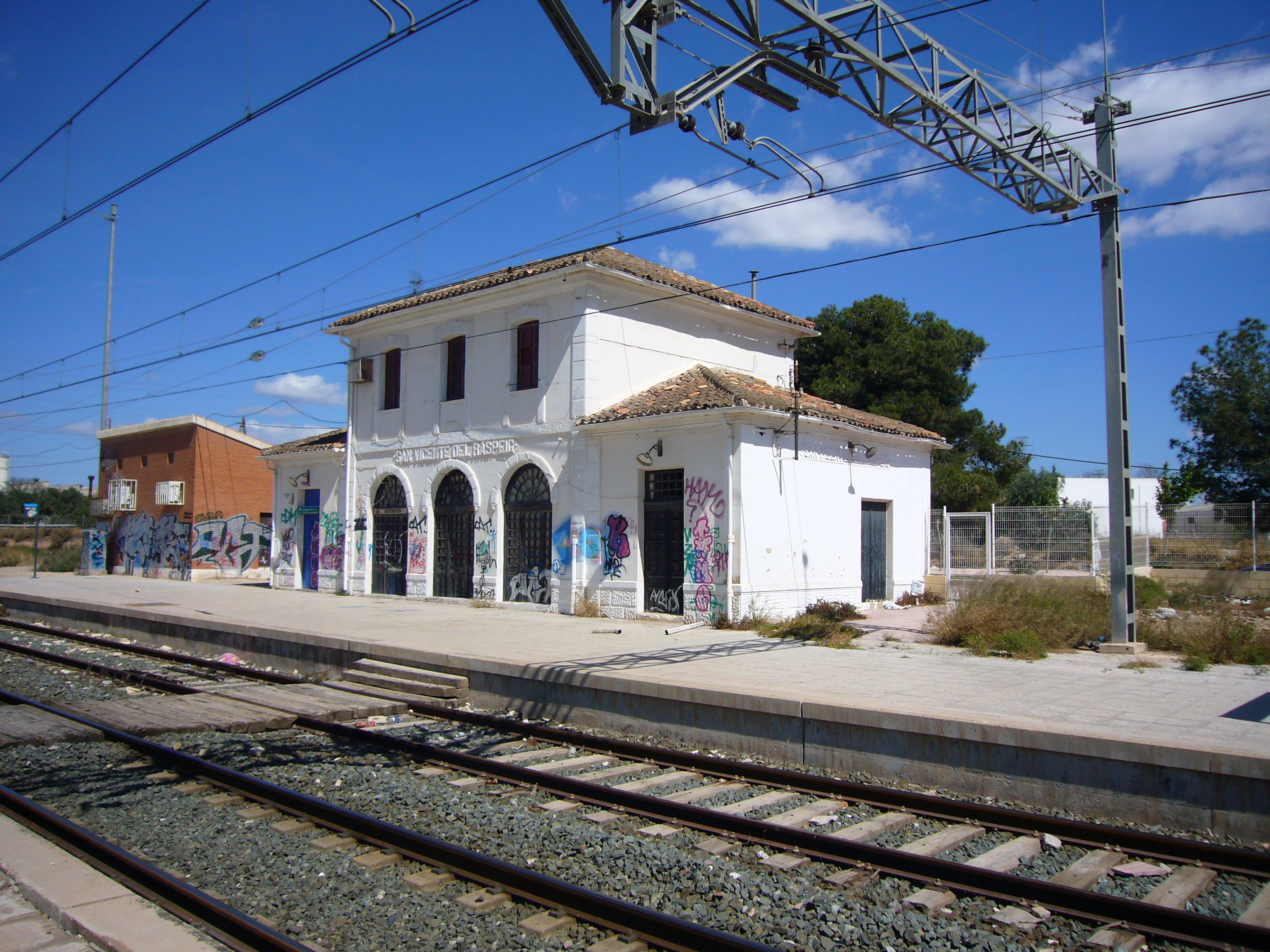 Antigua estación de tren de San Vicente del Raspeig (Alicante). En la actualidad se encuentra abandonada.